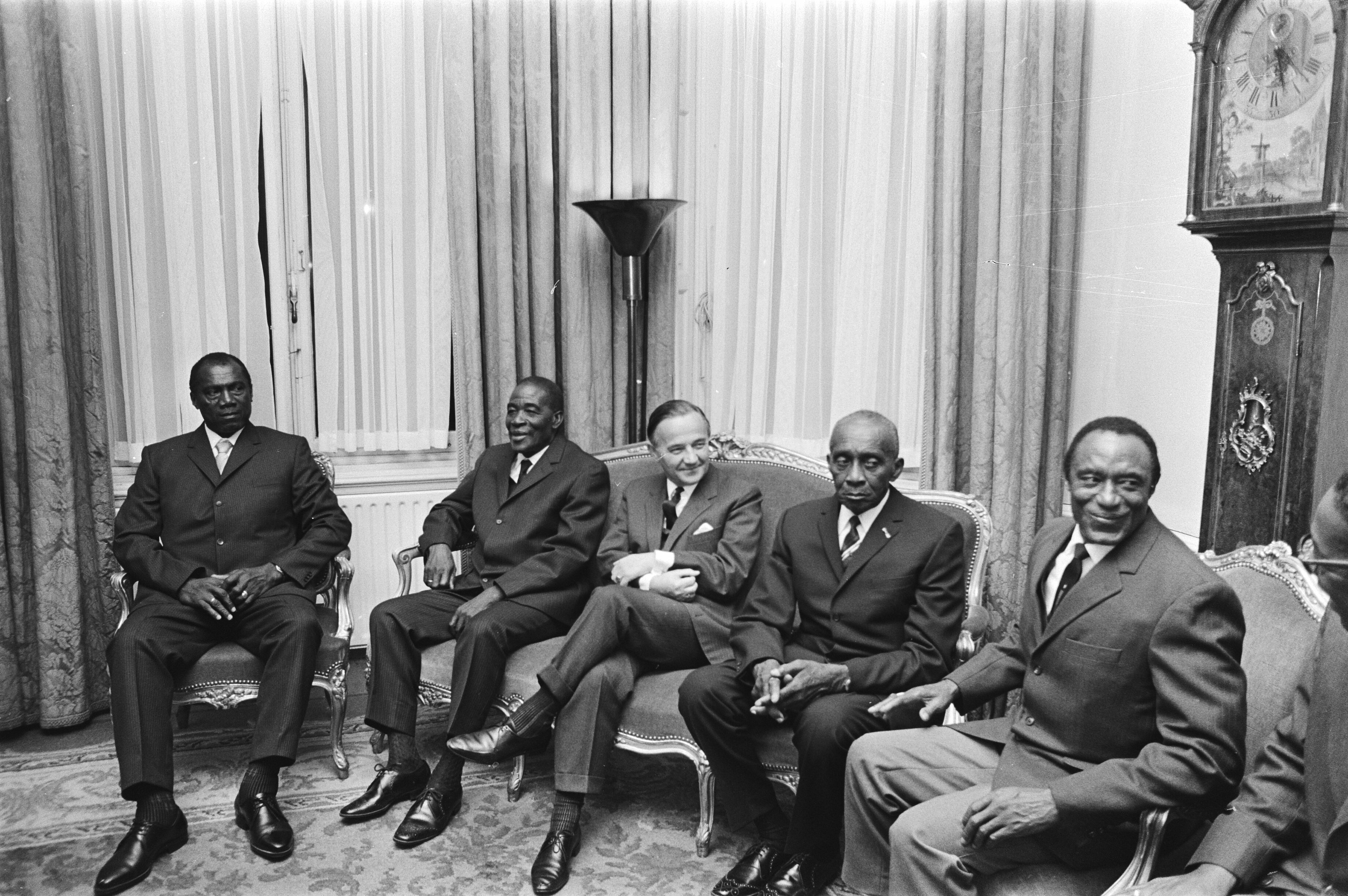 Collectie / Archief : Fotocollectie Anefo Reportage / Serie : [ onbekend ] Beschrijving : De Jong ontvangt 4 opperhoofden (Granmannen) uit Suriname Abonee (van Maturi Forster (van Paramaccaners), De Jong , Aboikoni Datum : 10 november 1970 Trefwoorden : ontvangsten Persoonsnaam : Jong, Piet de Fotograaf : Evers, Joost / Anefo Auteursrechthebbende : Nationaal Archief Materiaalsoort : Negatief (zwart/wit) Nummer archiefinventaris : bekijk toegang 2.24.01.05 Bestanddeelnummer : 924-0026